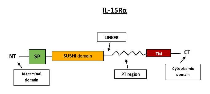 IL-15Ralfa receptor